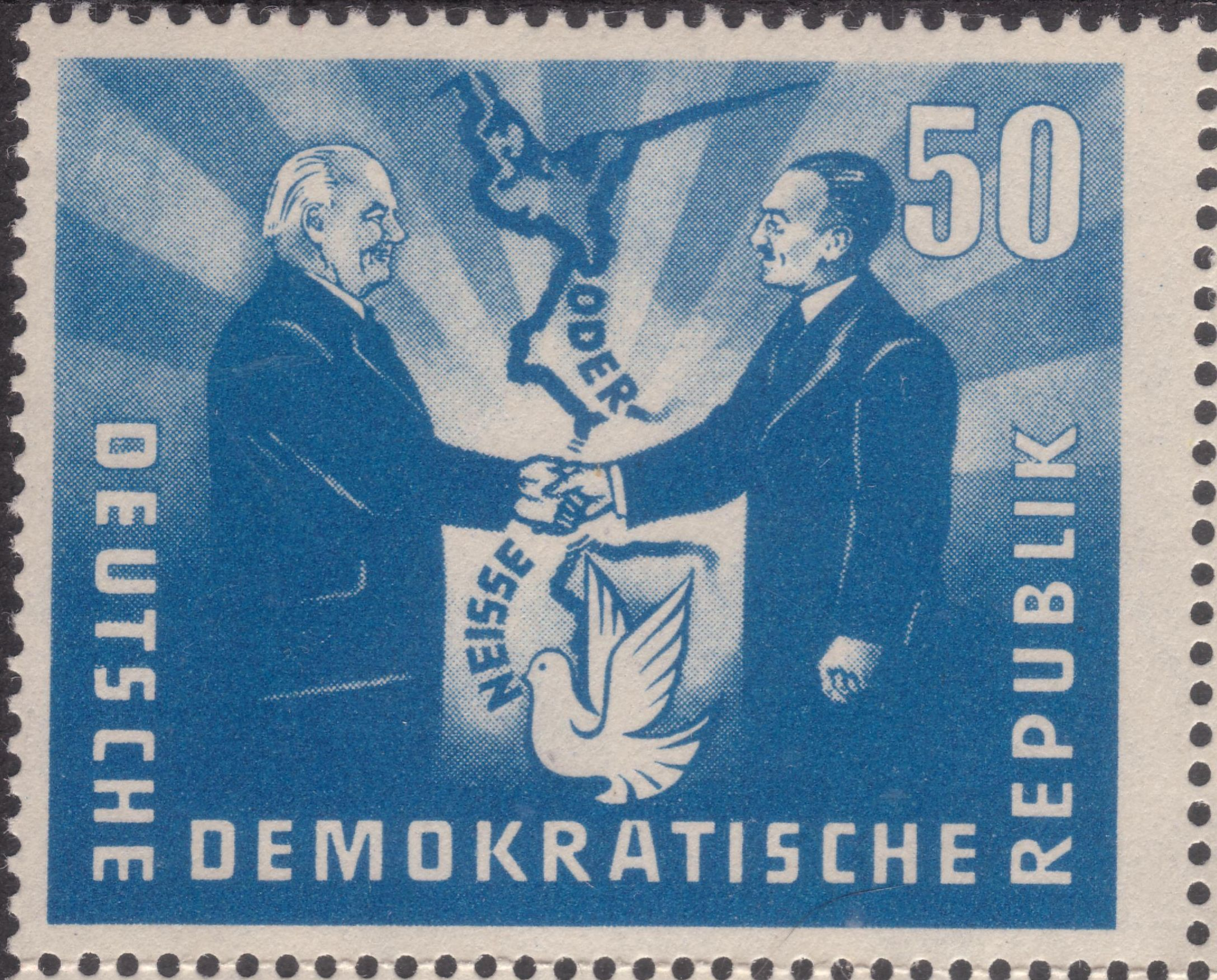 German stamp Oder-Neisse-Linie